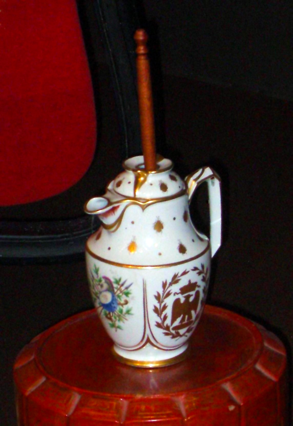 Chocolatière de pur style Empire, avec les abeilles symboles de Napoléon, l'aigle impérial et une allégorie à l'antique. Salon du chocolat, Paris.